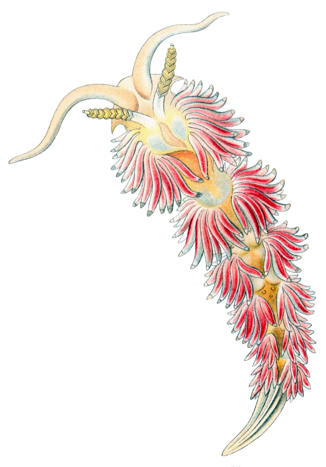 Aeolis coronata (Forbes) = Facelina auriculata coronata (Forbes & Goodsir, 1839)